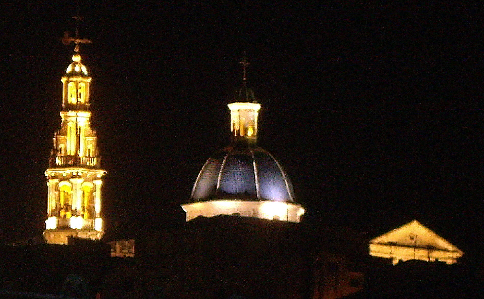 Església de Santa Maria de Nit. Iglesia de Santa María de Alcoi de noche.